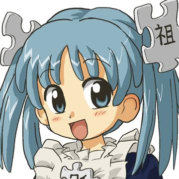 Wikipe-tan